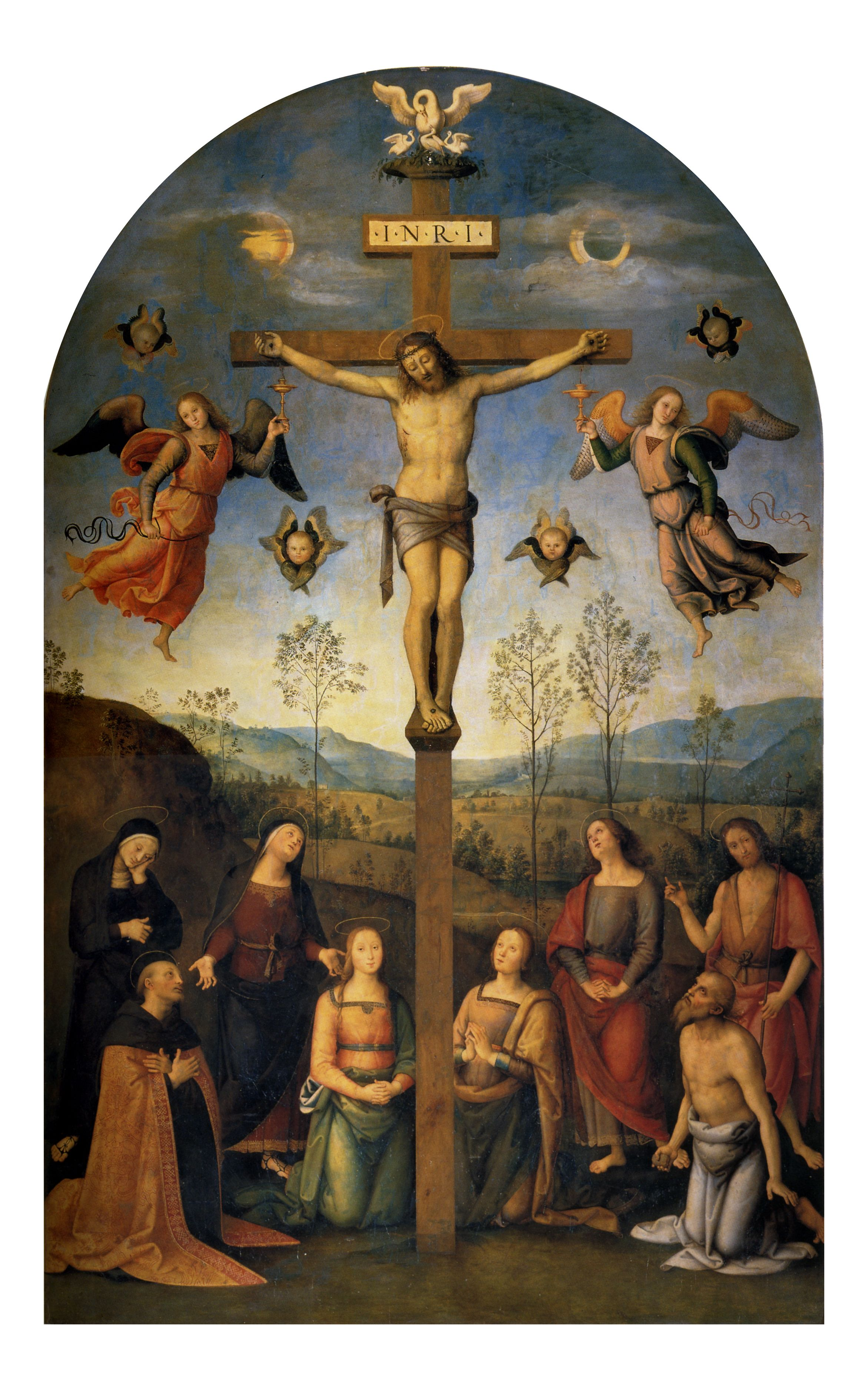 Pietro Perugino: Pala Chigi (Crocifissione). Cat. no. 72 in Vittoria Garibaldi: Perugino. Catalogo completo. Octavo, Firenze 2000, ISBN 88-8030-091-1